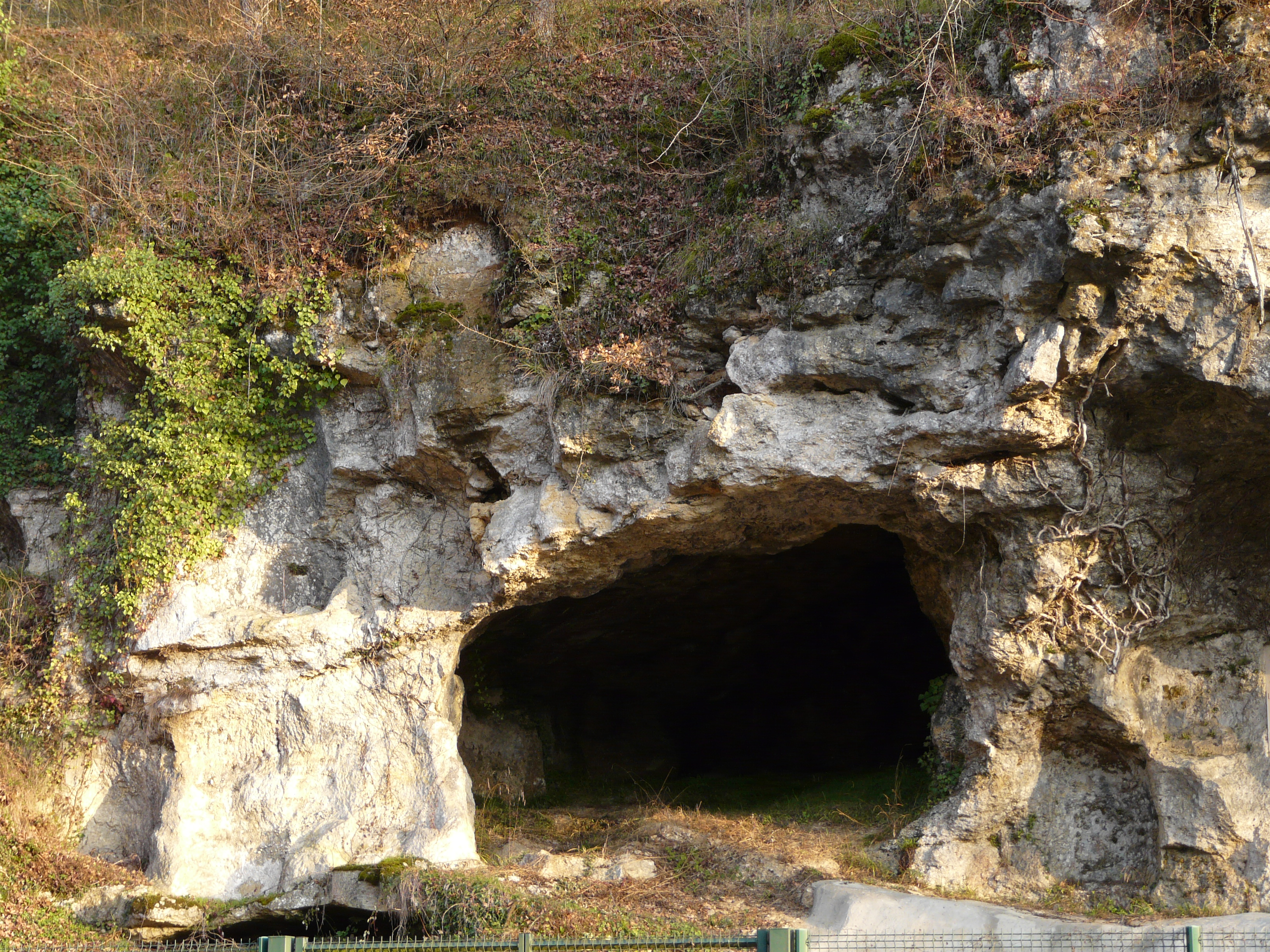 L'abri de Raymonden à Chancelade, Dordogne, France